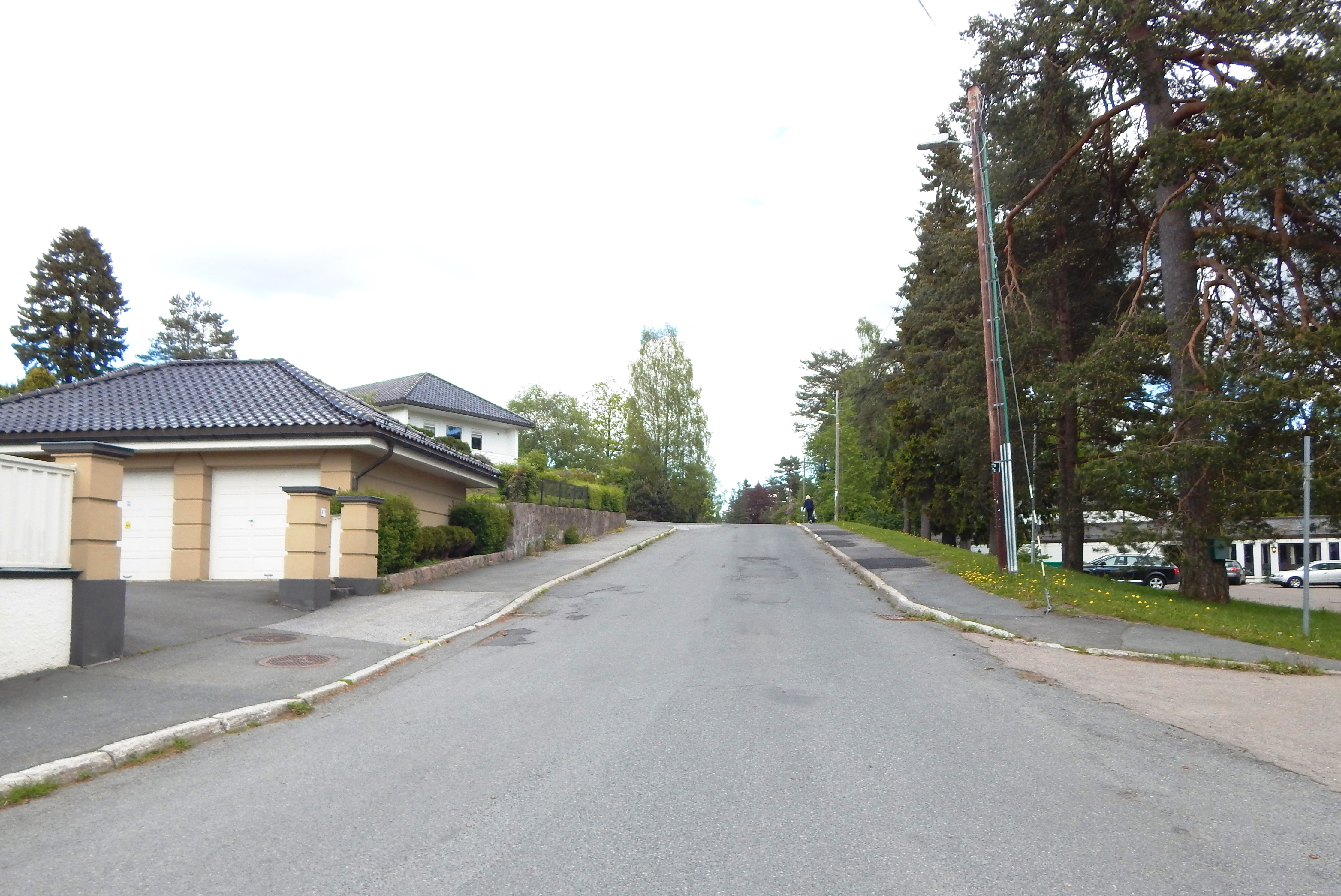 Kringsjågrenda like ved Nordberg kirke